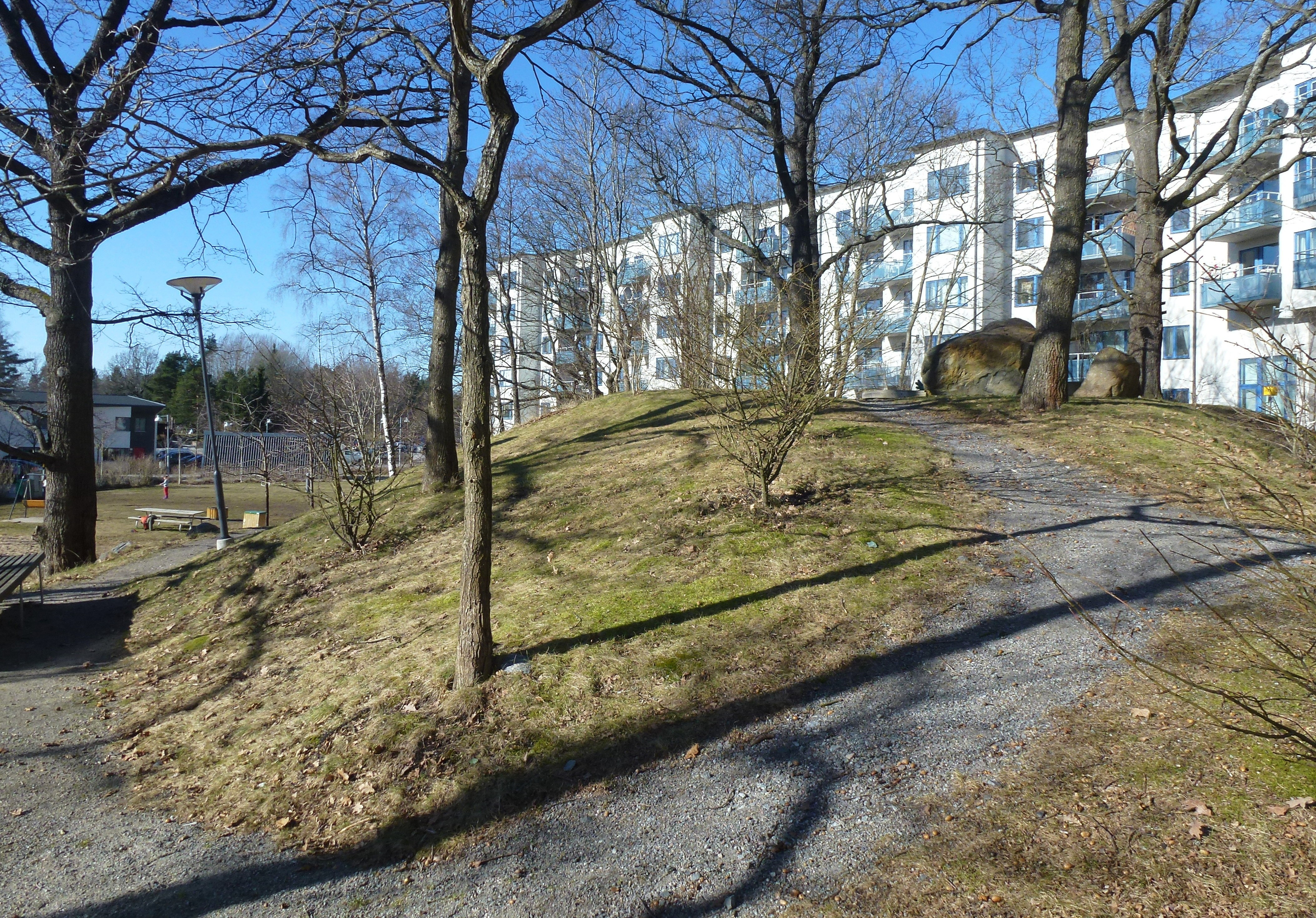 Kvarteret Bäverdalen i Rågsved, platsen för torpet Bjursätra